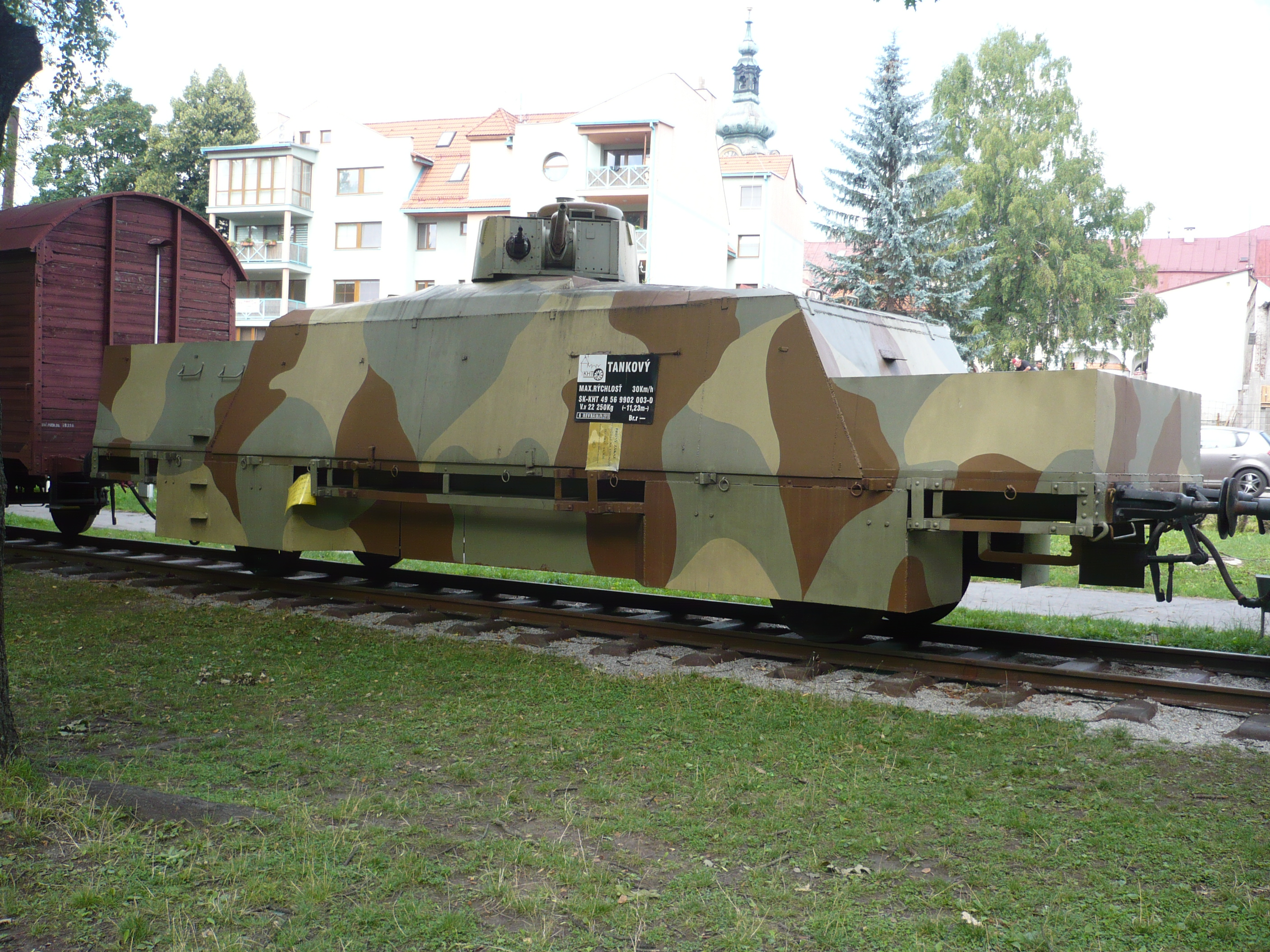 Tankový vozeň pancierového vlaku IPV I Štefánik so zabudovaným tankom LT vz. 35 v Múzeu SNP v Banskej Bystrici